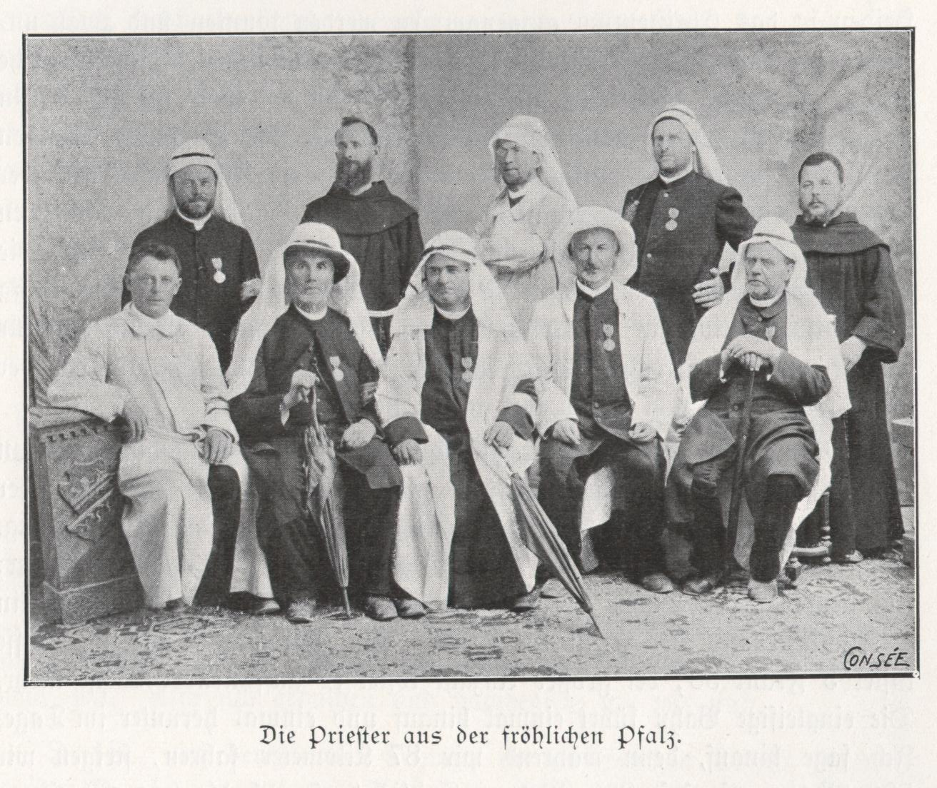 vorn rechts Joseph Schwind, Domkapitular Speyer